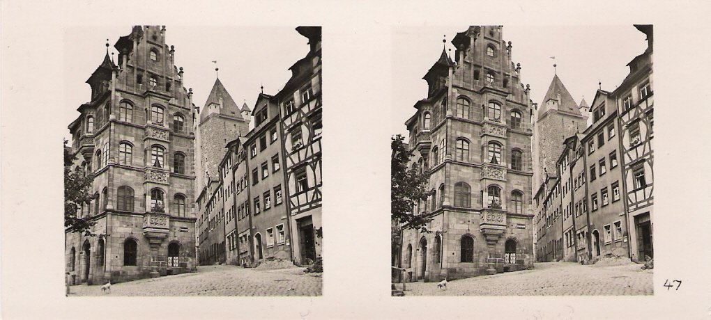 Raumbild (Stereographie) aus dem Album "Der Stadt Nürnberg Ursprung und Werdegang", Fotograf Hermann Großberger/Hermann Schoepf, Erscheinungsjahr des Buches 1949, Raumbild-Verlag Otto Schönstein, Saarbrücken, Fotografie wahrscheinlich älter